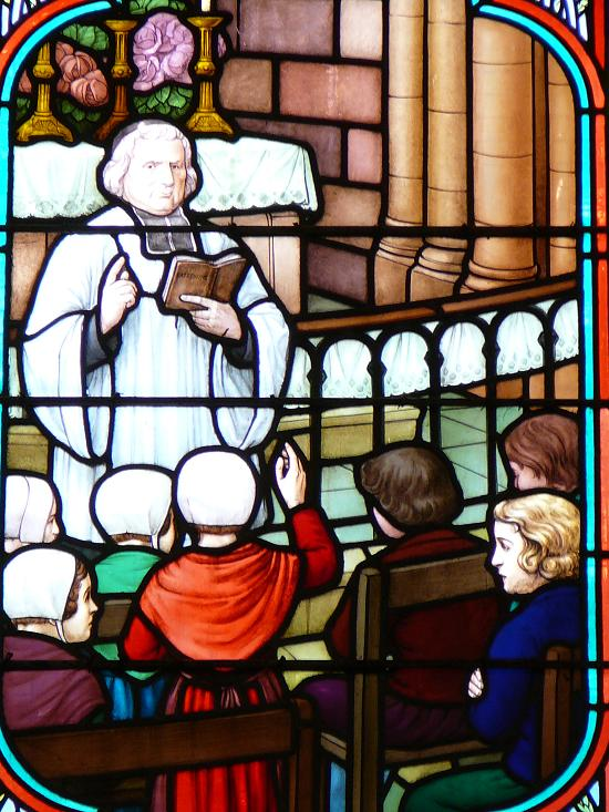 Vitrail situé en l'église Saint-Martin de la-Salle-de-Vihiers, représentant le P. Catroux faisant le catéchisme aux enfants.